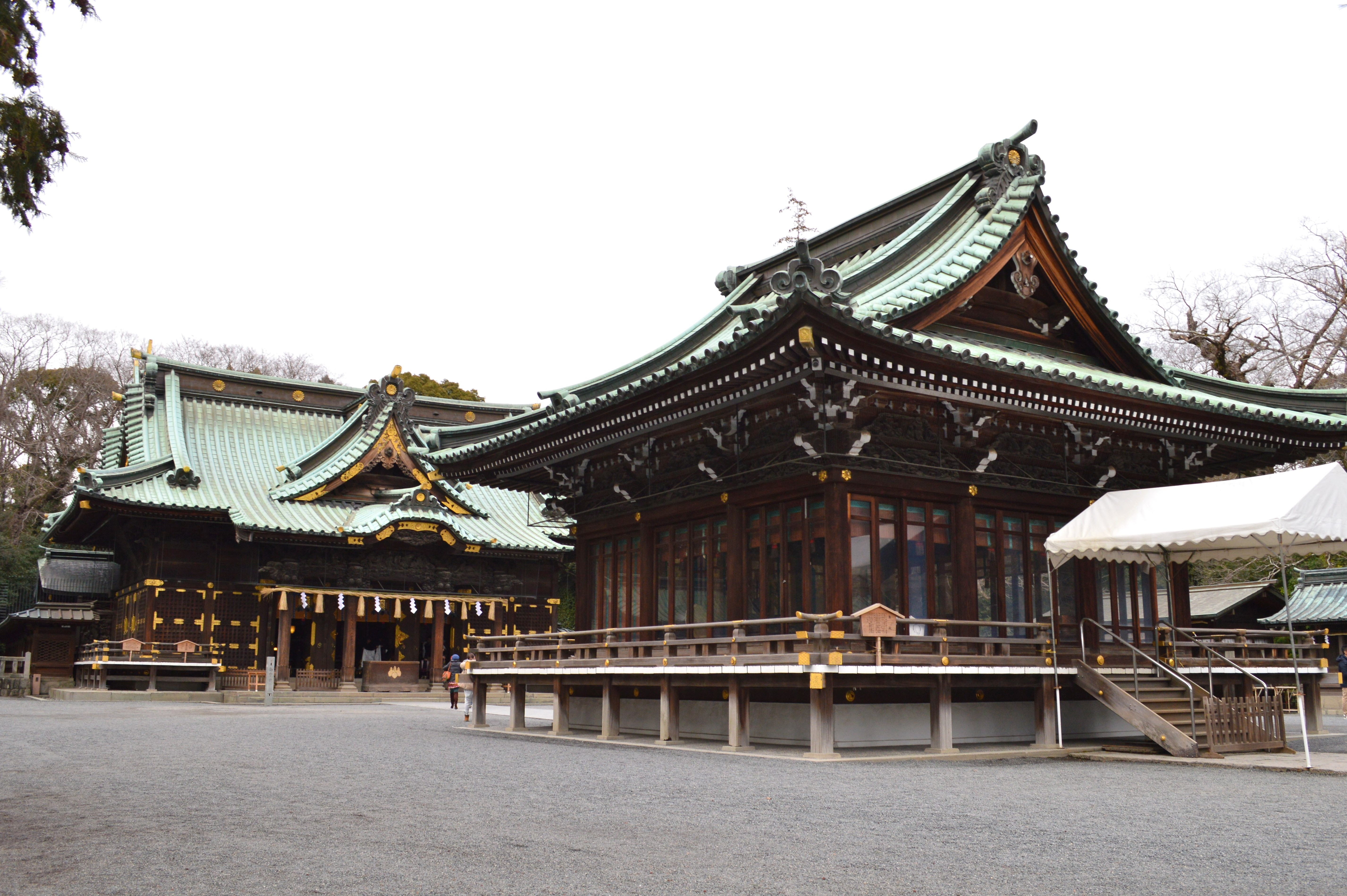 三嶋大社の舞殿と拝殿（奥）。